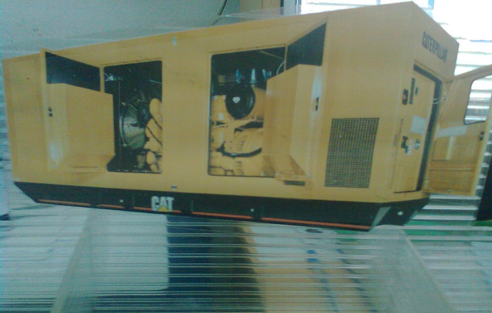 Imagen a escala de generador diesel Caterpillar con casilla